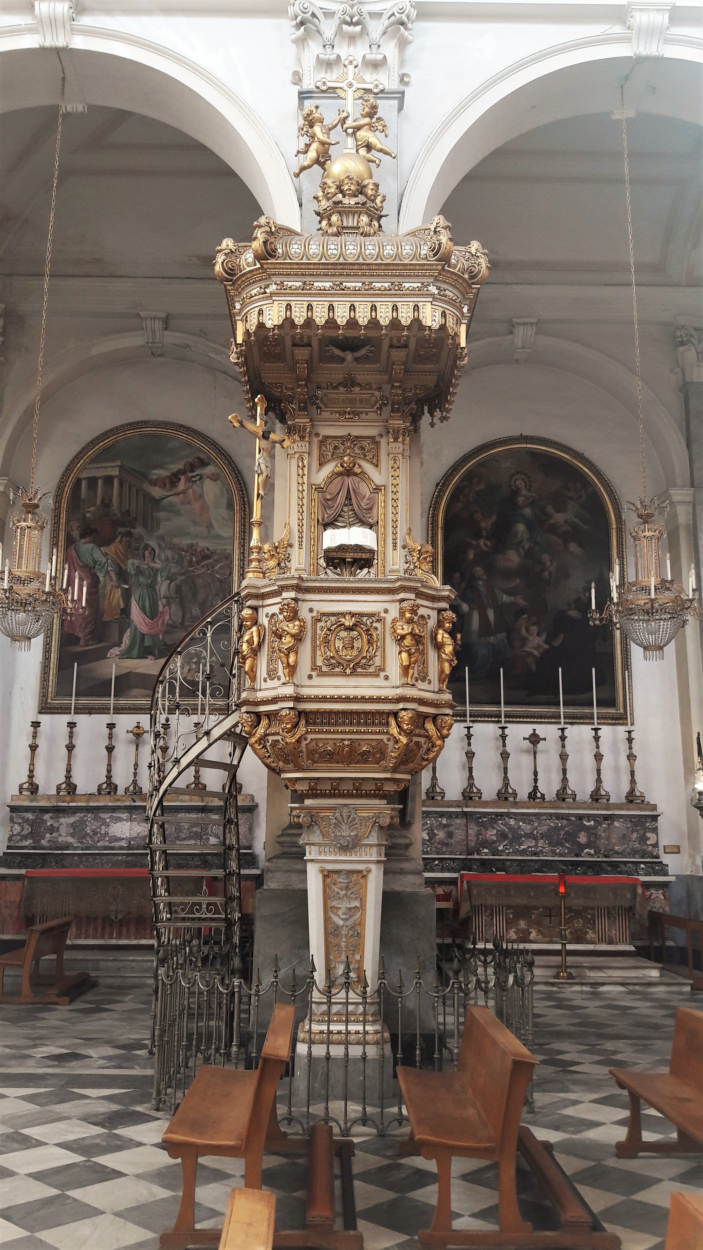 Pulpito progettato da Carlo Sada